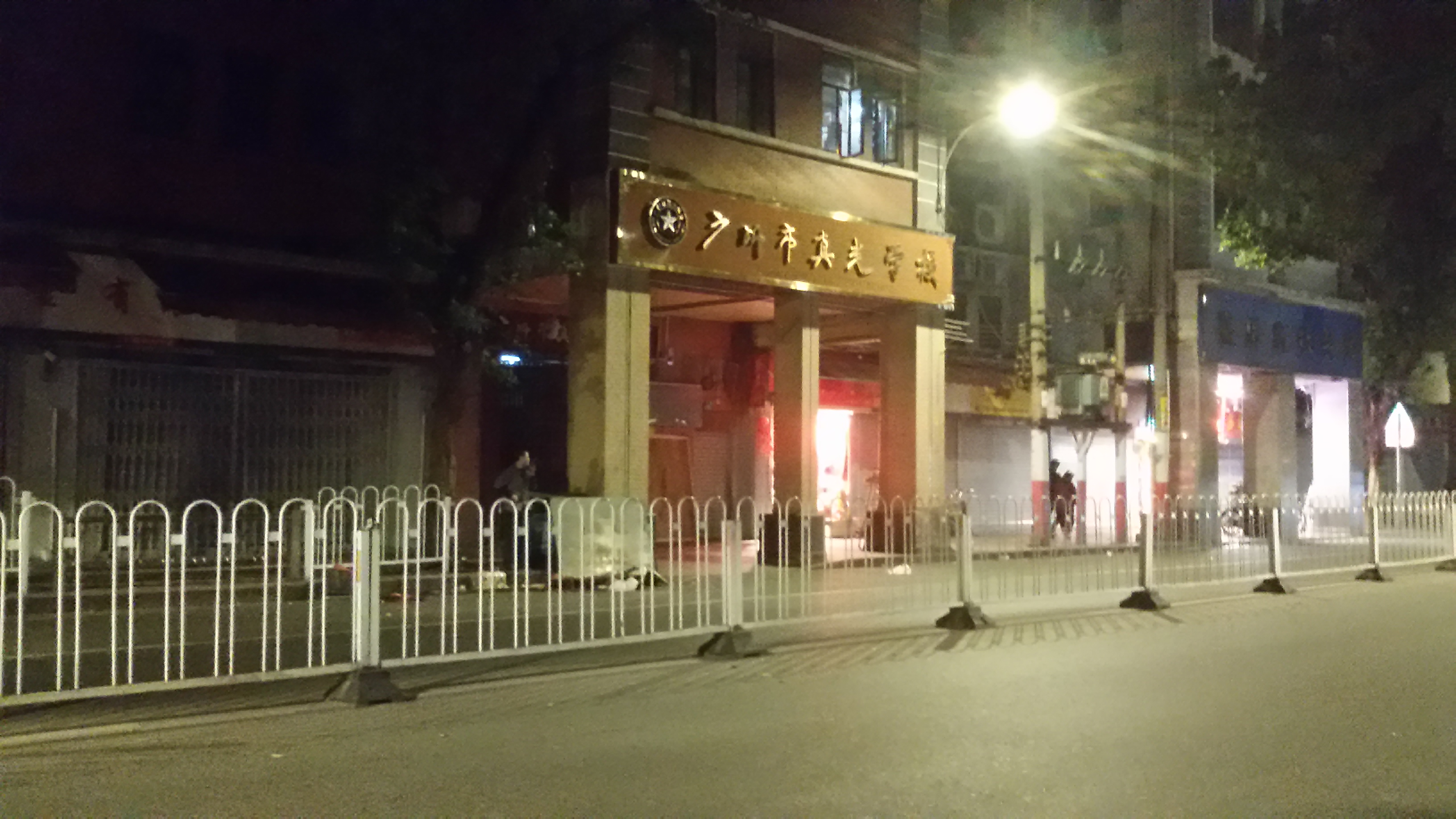 粵語: 广州市真光中学（小学部）